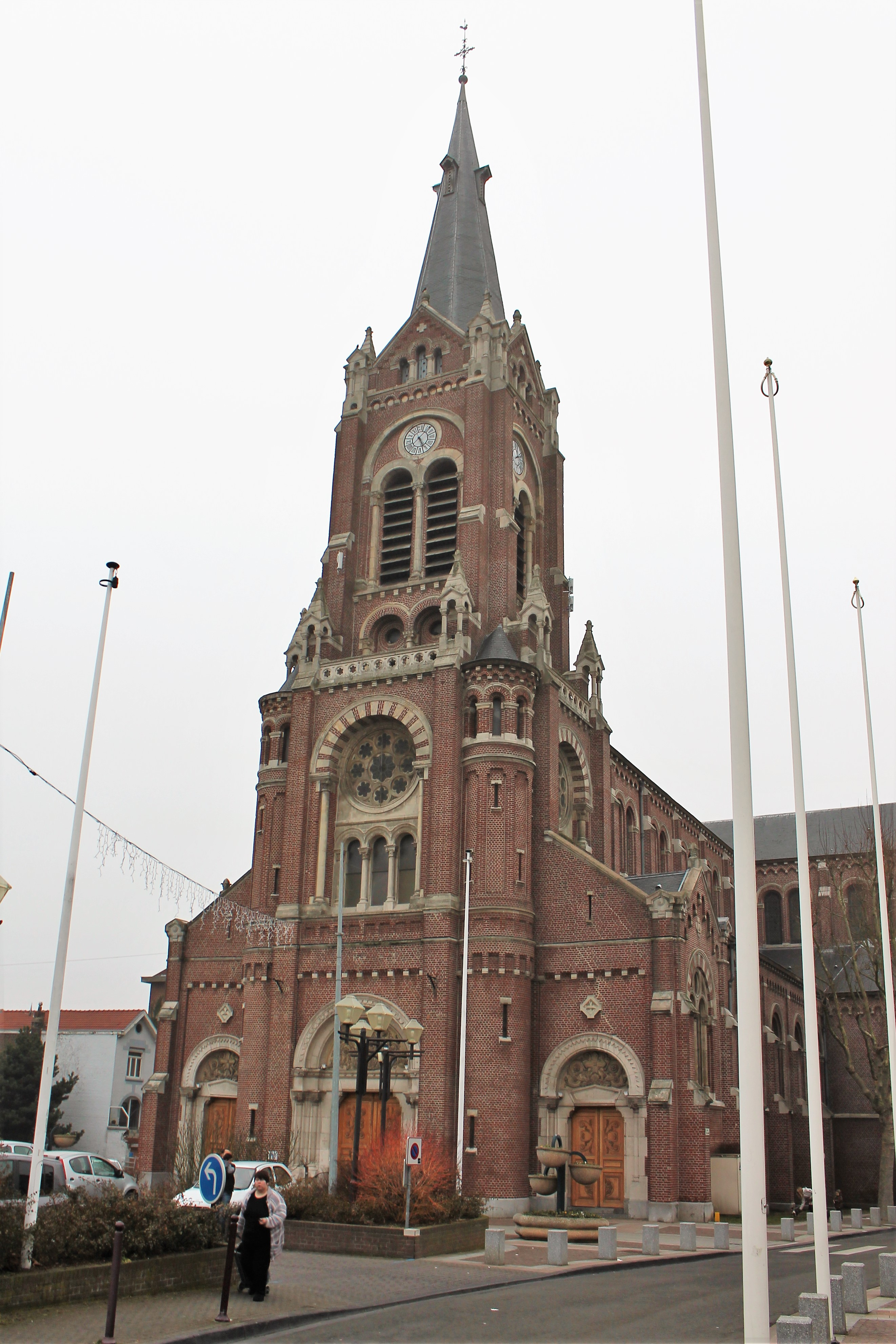 L'Eglise Saint-Maclou de Wattrelos est la plus ancienne église de la commune. Edifiée en 1621, elle fut reconstruite en 1877, et restauré près d'un siècle plus tard par la municipalité.